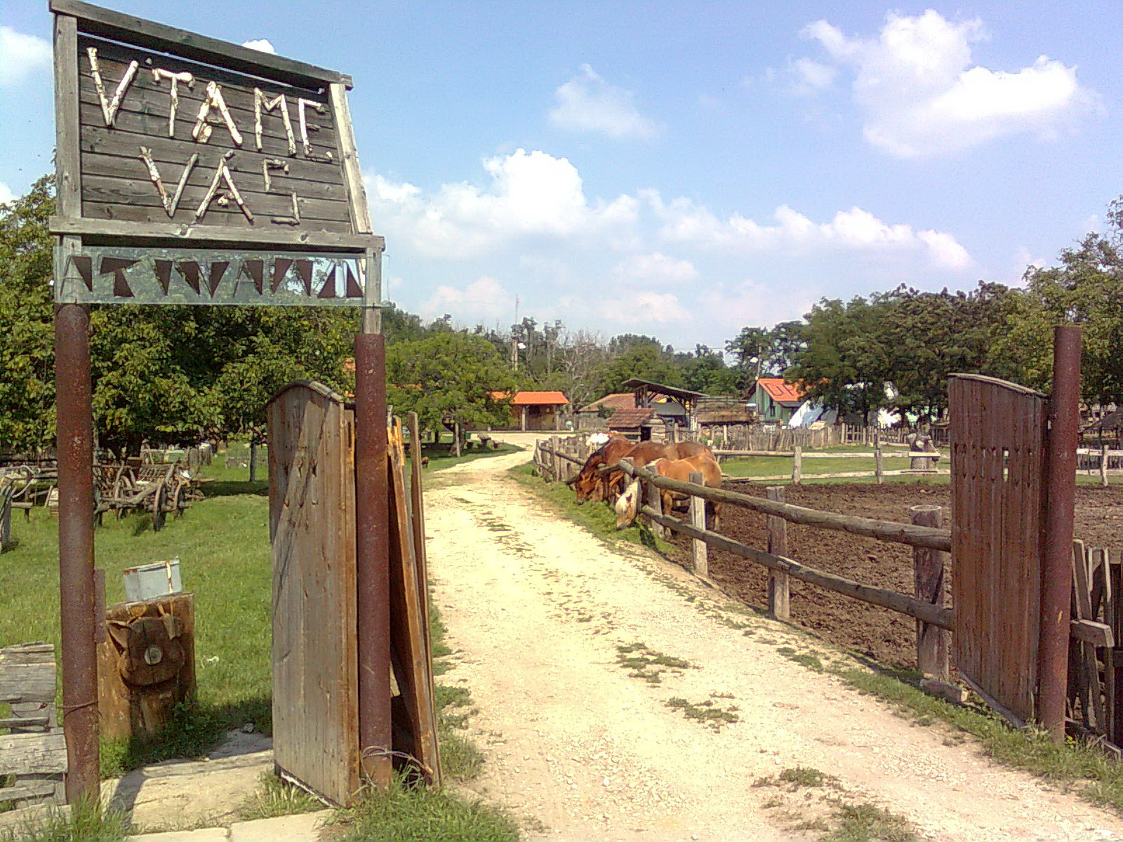 Detská farma Humanita